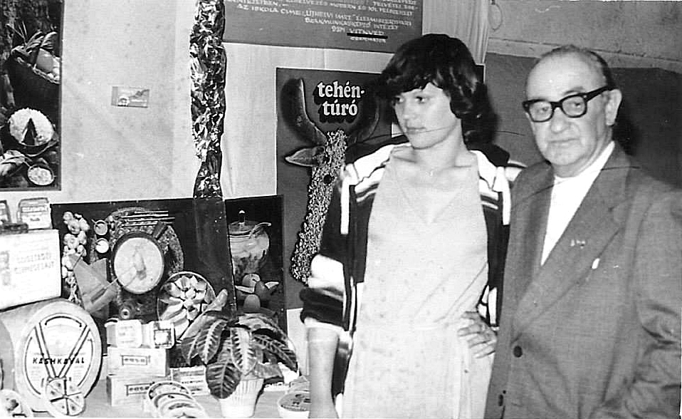 Csermajor bemutatkozik